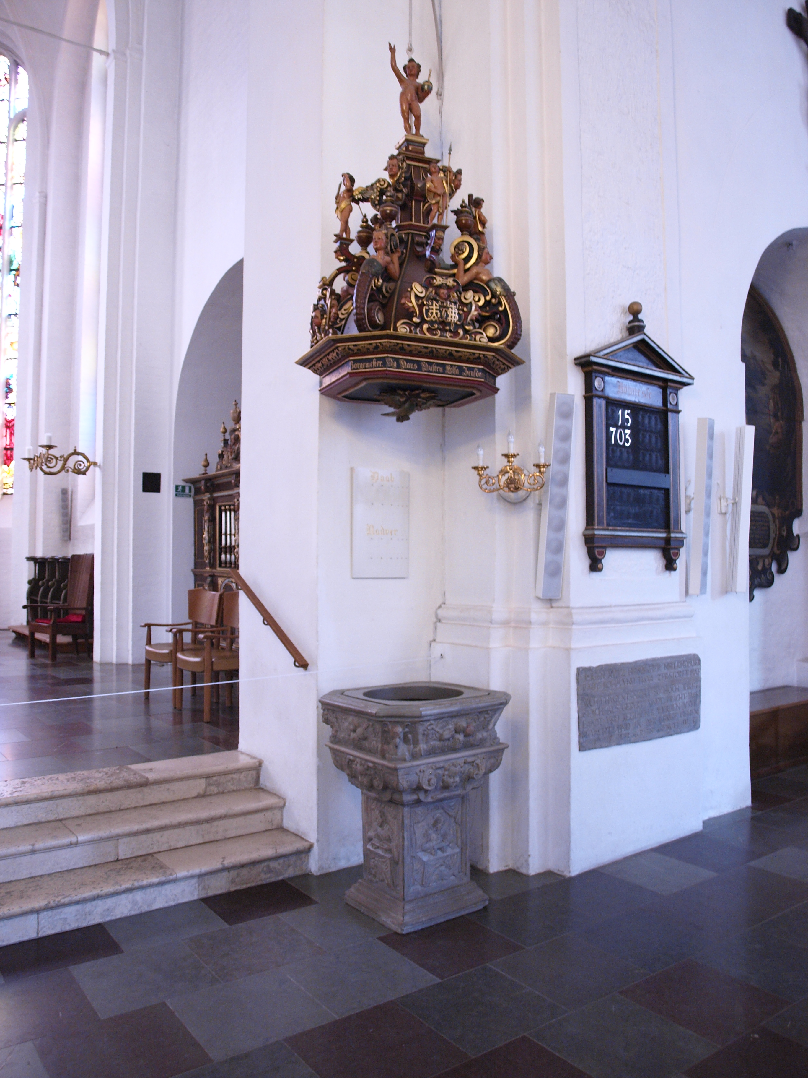 Døbefont i Sankt Nikolai Kirke (Kolding)